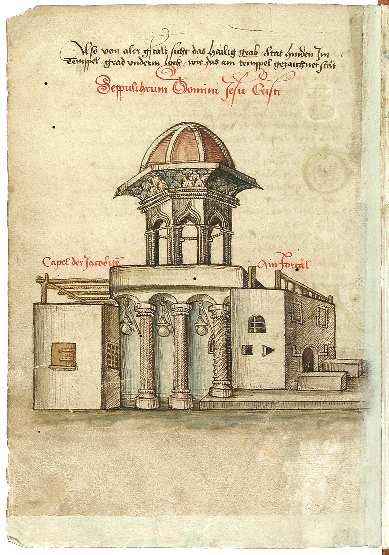 Schilderung einer Pilgerreise von Konstanz nach Jerusalem durch Konrad von Grünenberg, um 1487 Konrad von Grünenberg: Beschreibung der Reise von Konstanz nach Jerusalem - Cod. St. Peter, pap. 32. Handschrift, Bodenseegebiet (Konstanz?), um 1487. II + 53 Blätter, 32x21, mit 31 kolorierten Zeichnungen der Reiseroute von Venedig bis Palästina. Text in alemannischer Mundart.